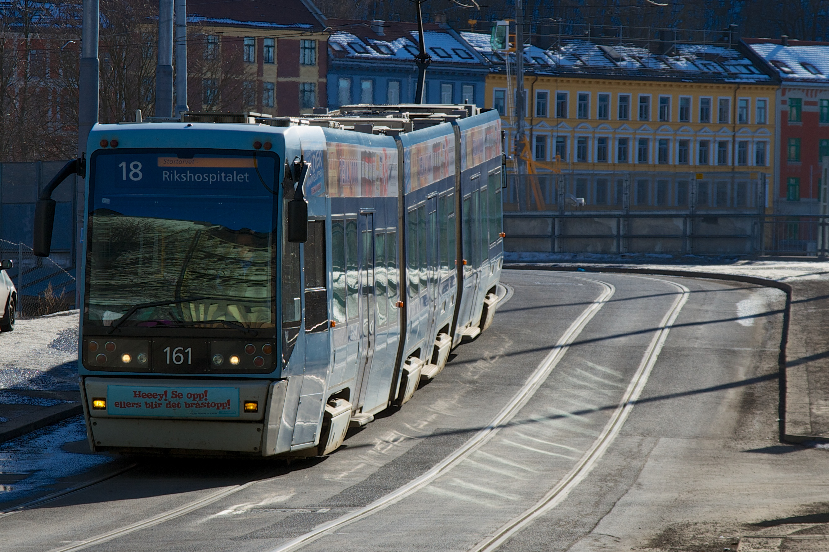 Trikk i Oslo gate